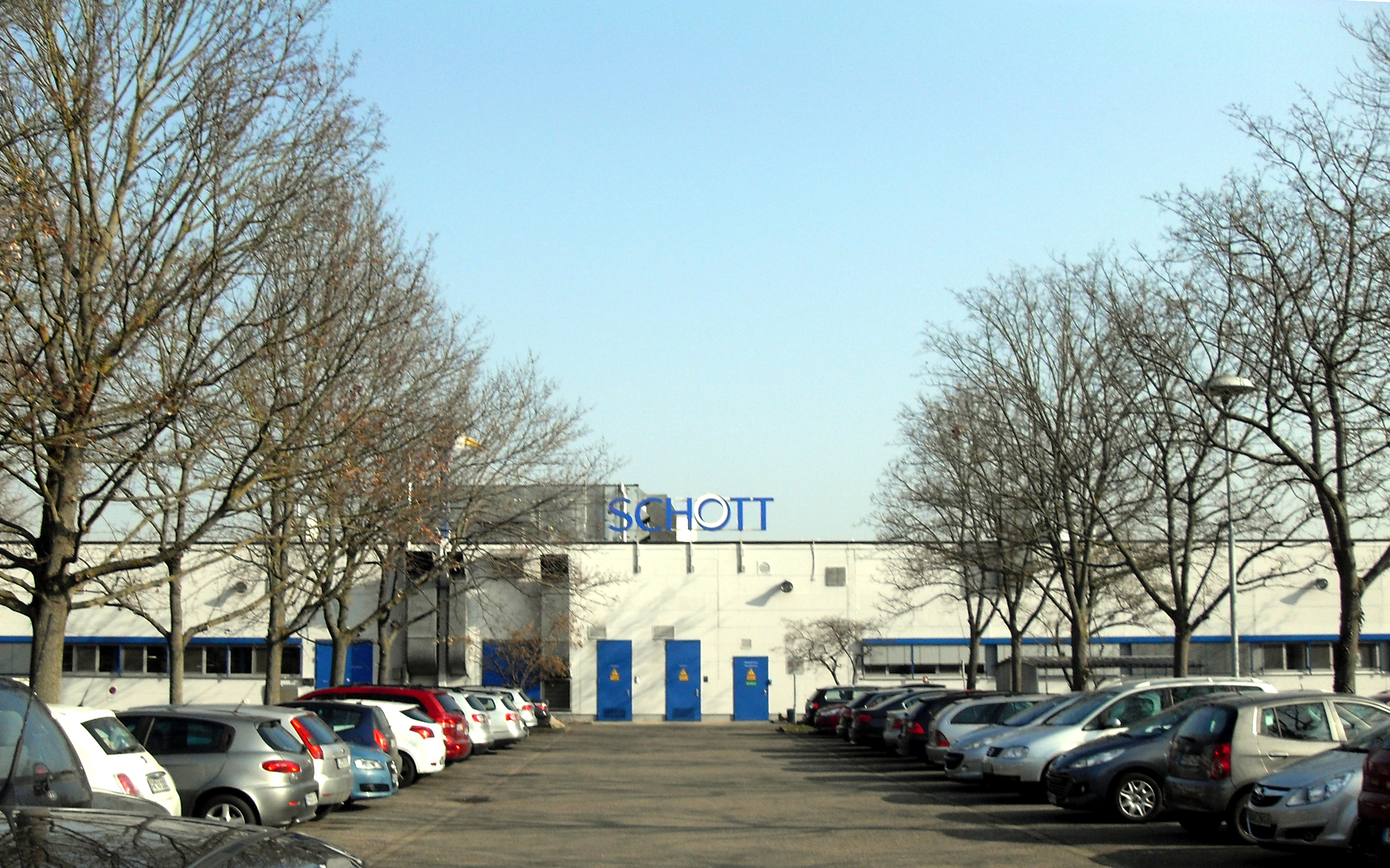 Schott-Produktionsstandort in Hügelheim, Produzent von Glaskeramik-Kochflächen, Solarstrommodulen, Glas-Metall-Gehäusen, Farbfiltern und Spritzen